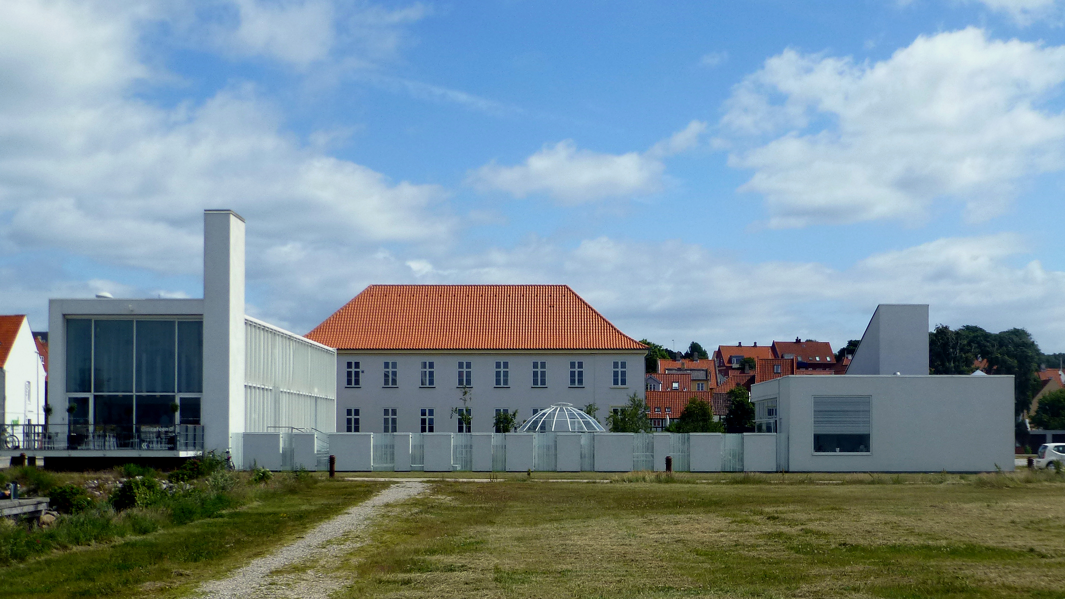 Glasmuseet Ebeltoft set fra vest